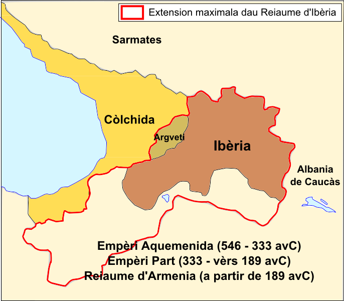 Reiaumes ancians de Caucàs Occidentau.